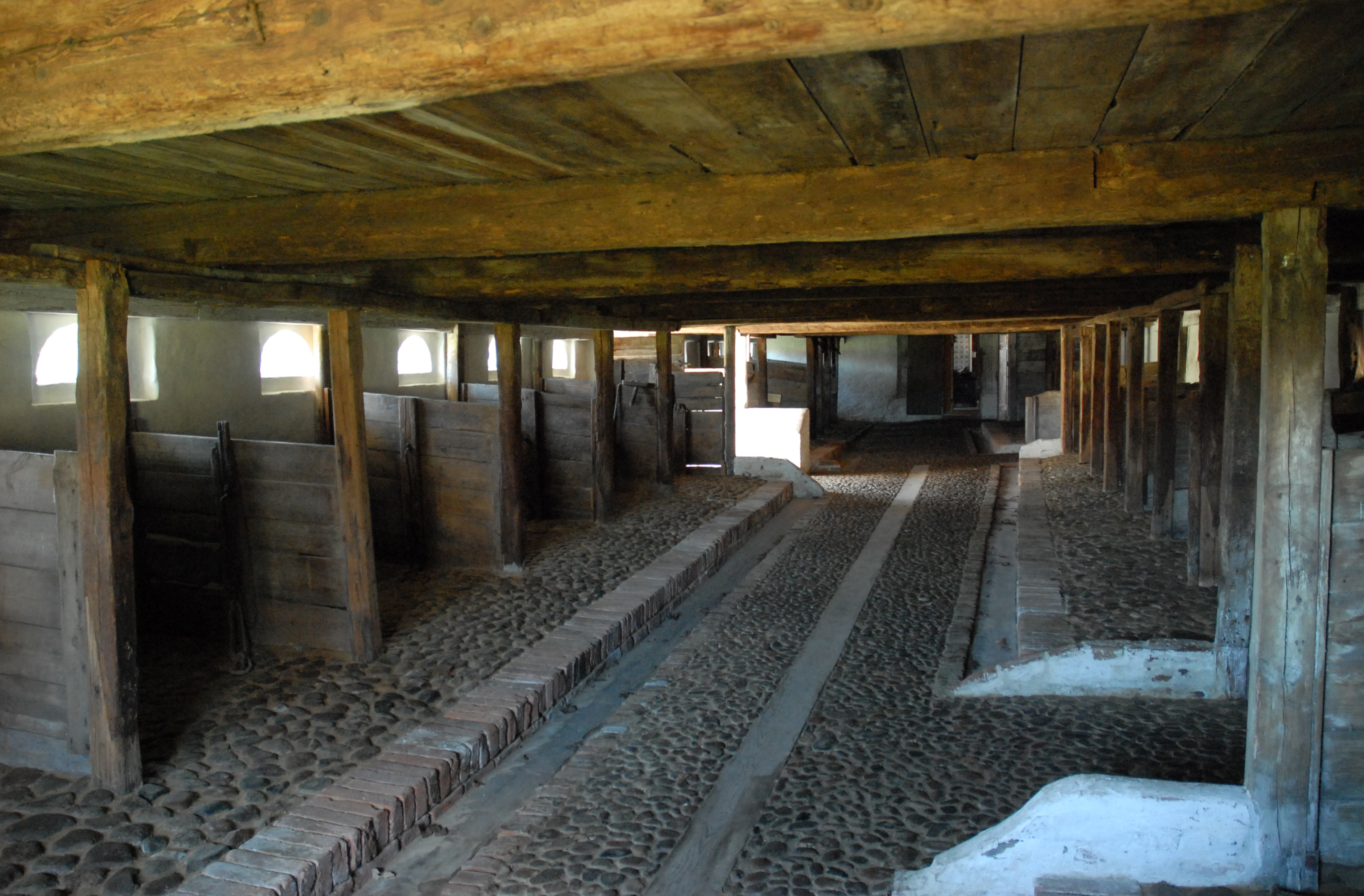 I den store kostald er køreplanken nedfældet i gulvet, så det var nemmere at køre med møgbøren